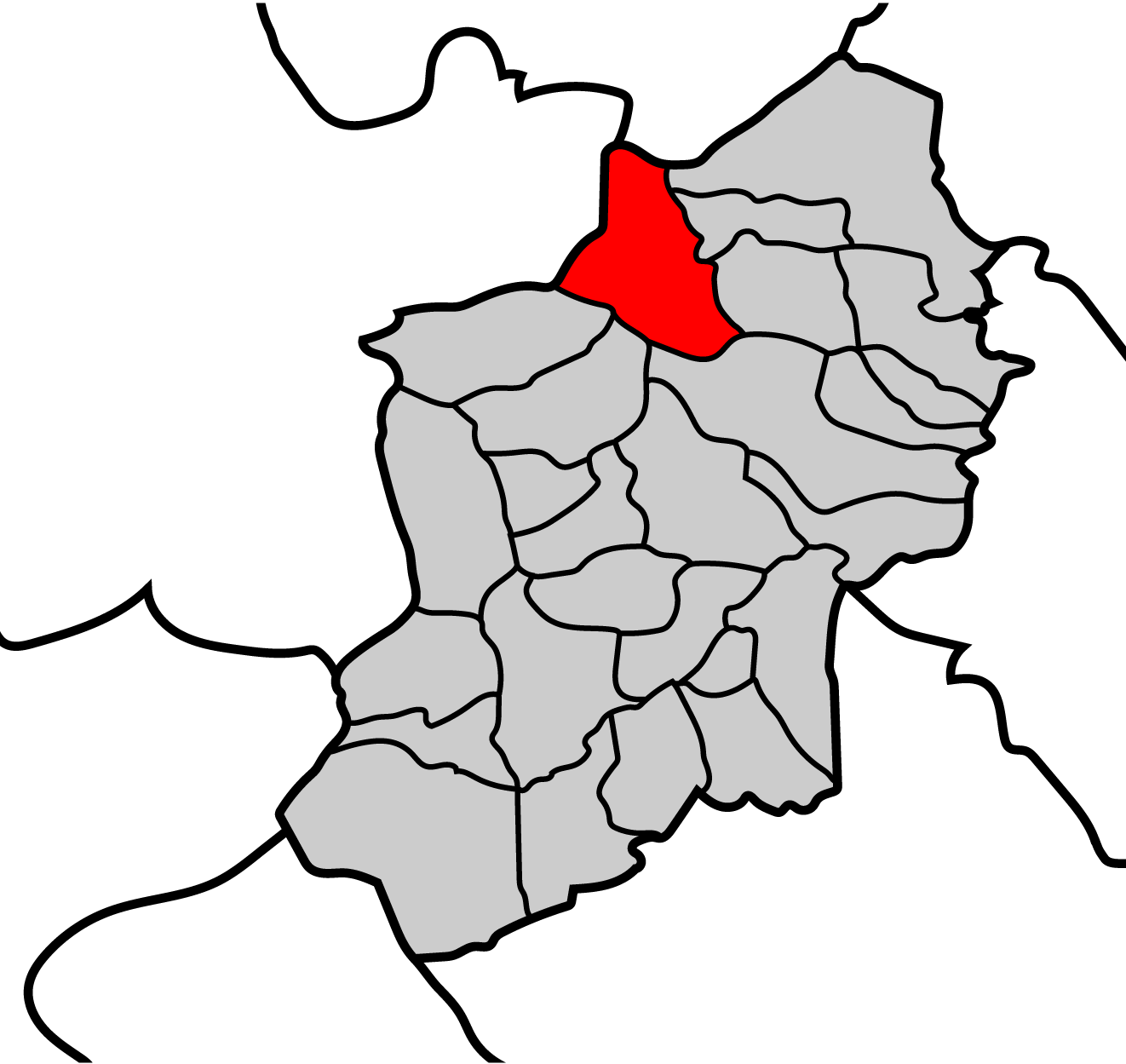 Mapa de la parroquia de Fontarón ayuntamiento de Becerreá